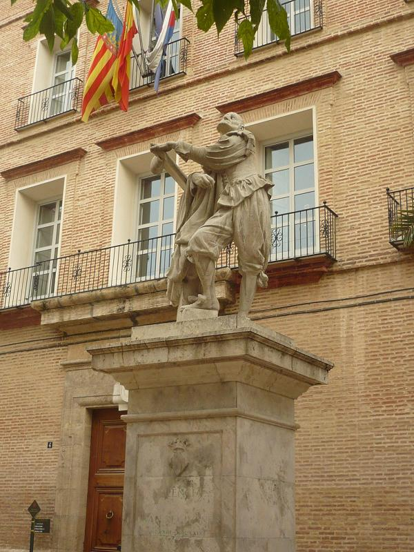 Juan de Juanes contemplando la fachada de la Iglesia del Carmen, en la plaza del mismo nombre de Valencia.